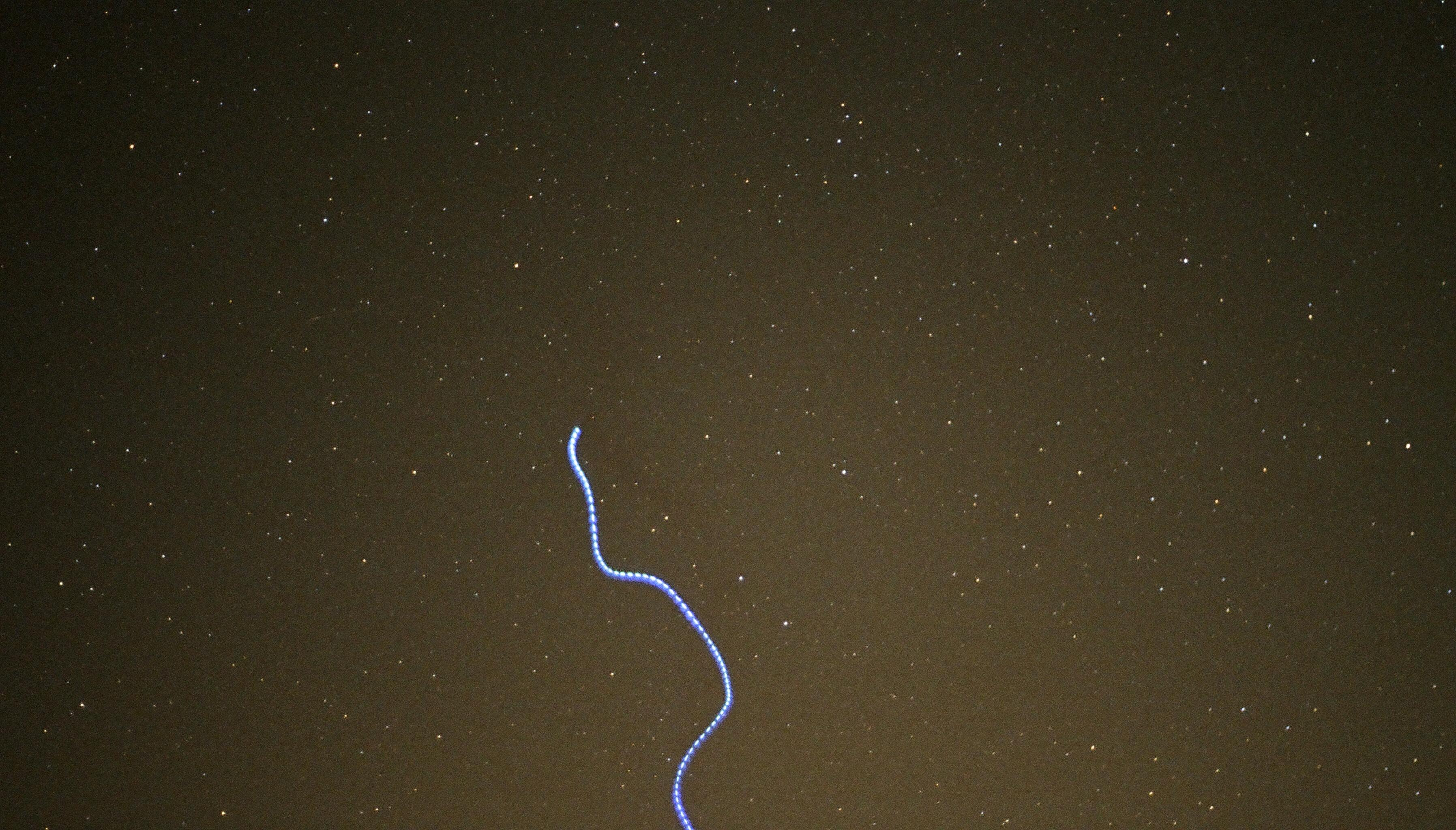 Ballongetragener Lichteffekt Aufnahmezeitpunkt: 19. November 2009 17:22 Uhr WZ Brennweite: 50 mm 400 ASA APS-Film Blende: 1.8 Belichtungszeit: 15 Sekunden